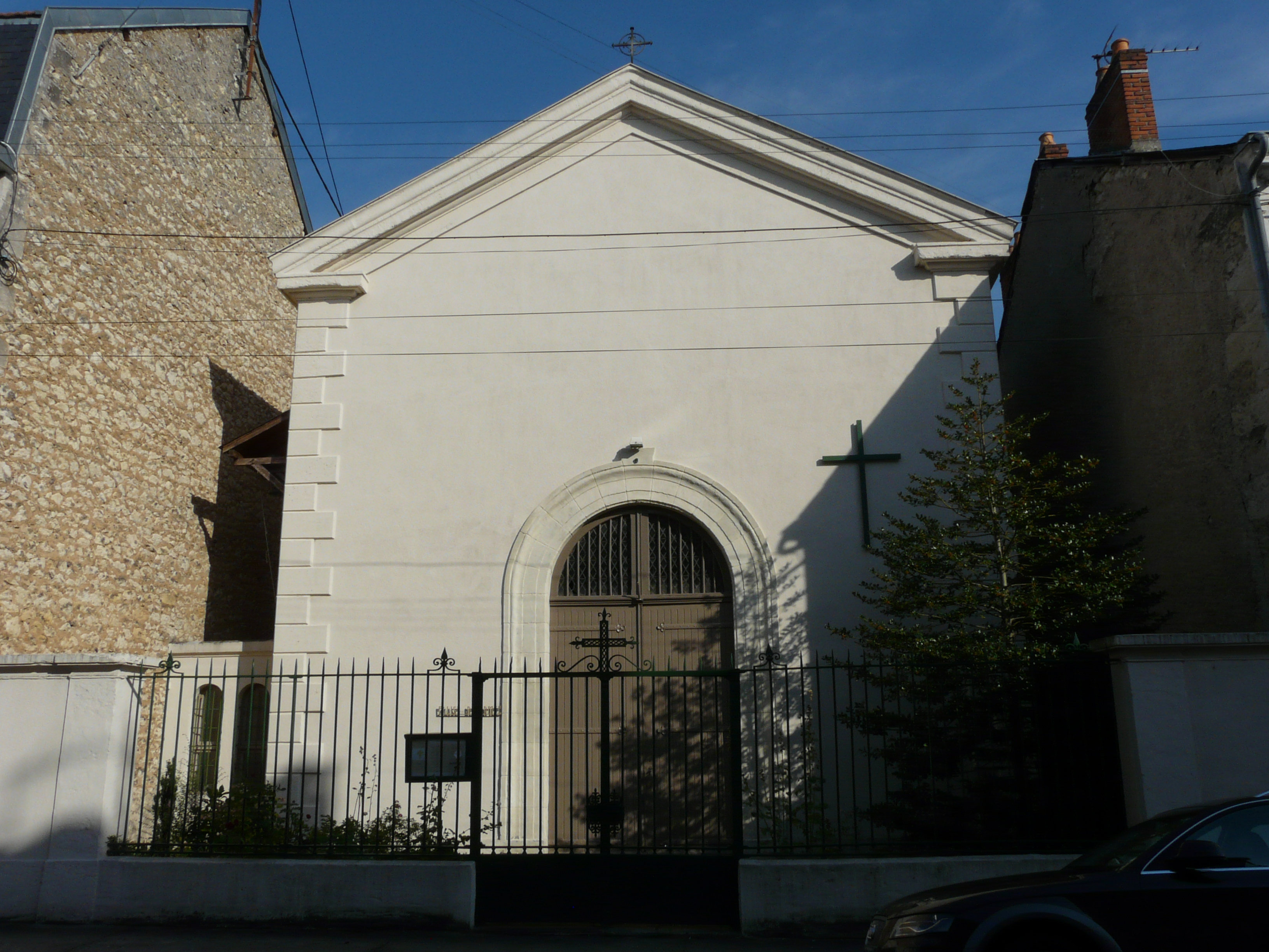 Le temple de l'Église réformée de France, Périgueux, Dordogne.